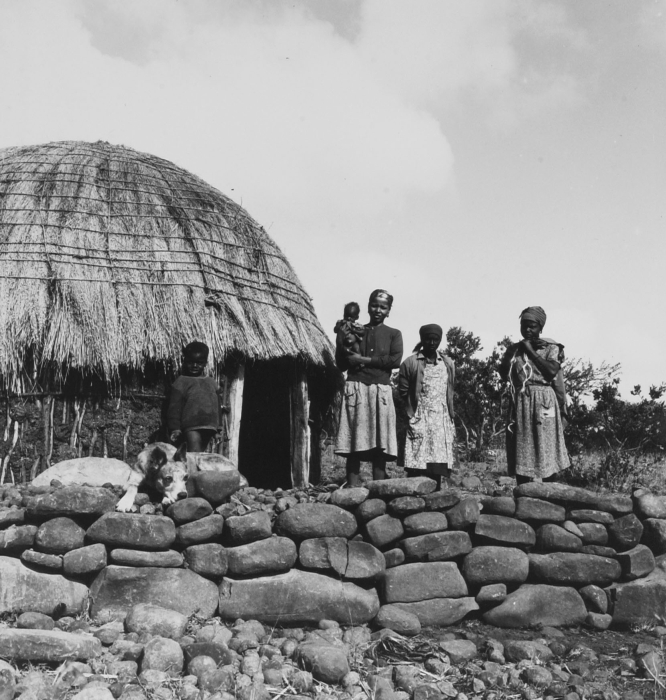 Zie eveneens inventarisnummer 20014798 voor een zijaanzicht. Deze opname is even daarvoor genomen. Van de vrouw met het kind op de arm bestaat ook een portretfoto onder inventarisnummer 10004281.